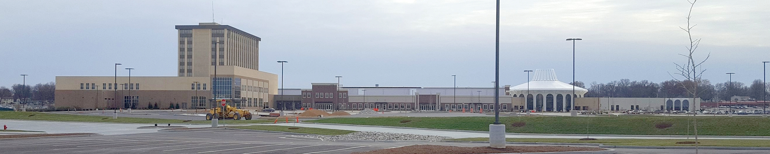 Northwest Plaza, St. Ann, Missouri.